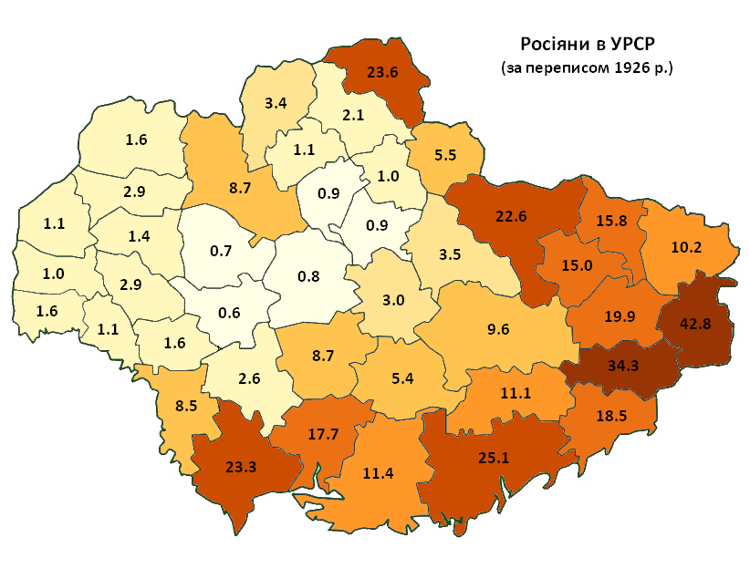 Розселення росіян в УРСР за даними перепису 1926 р. / Russians in Ukrainian SSR according to 1926 census